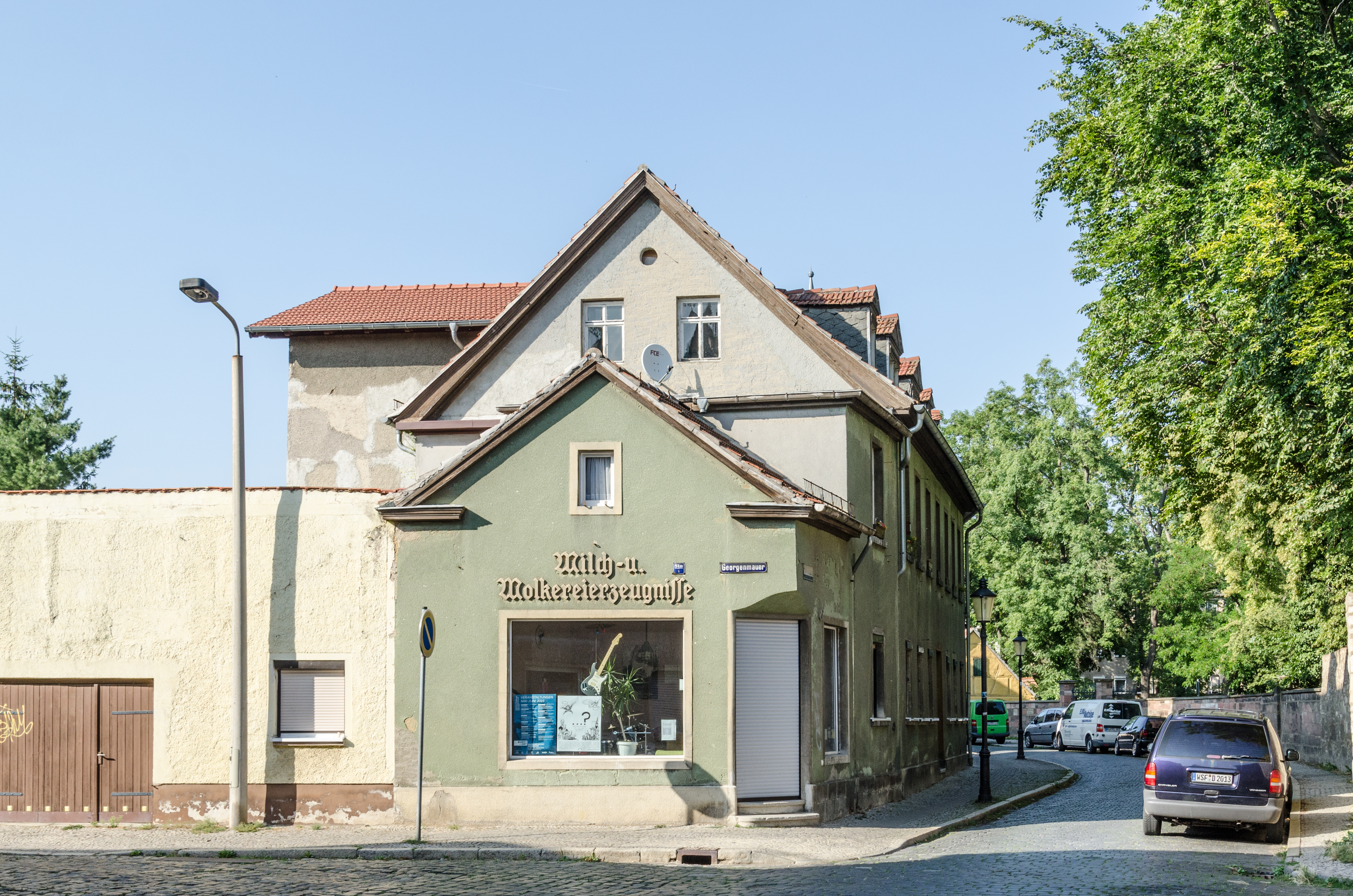 Naumburg, Windmühlenstraße 24